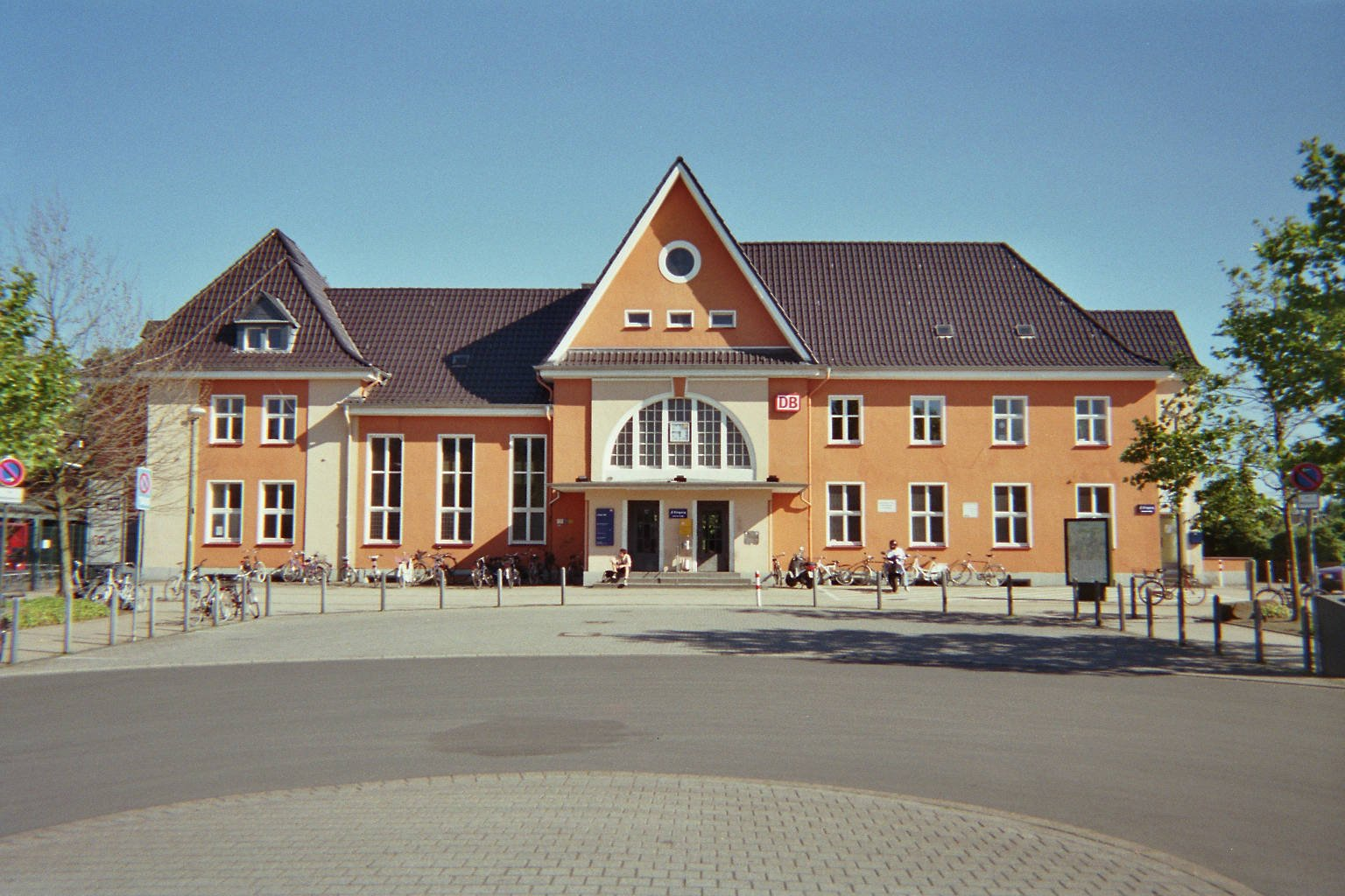 Der hauptbahnhof von Lünen, eigenes Foto